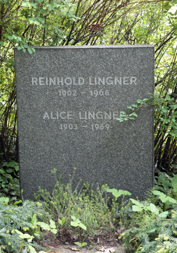 Grabstätte des Landschaftsgärtners Reinhold Lingner in der Reihe der Künstlergräber, Friedhof Berlin-Friedrichsfelde